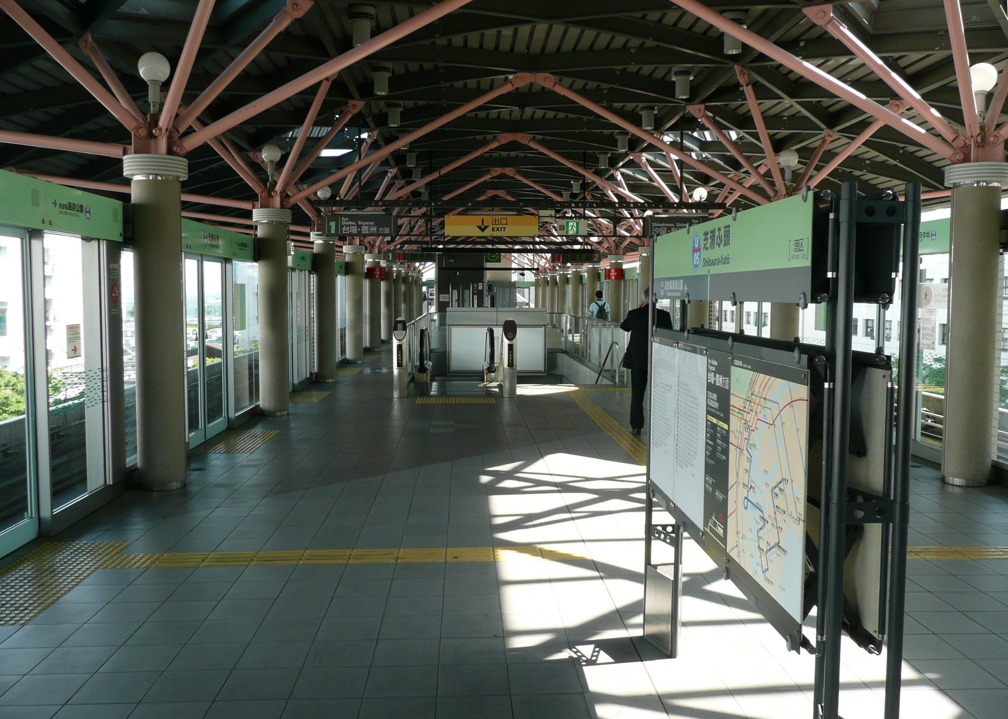 芝浦ふ頭駅ホーム